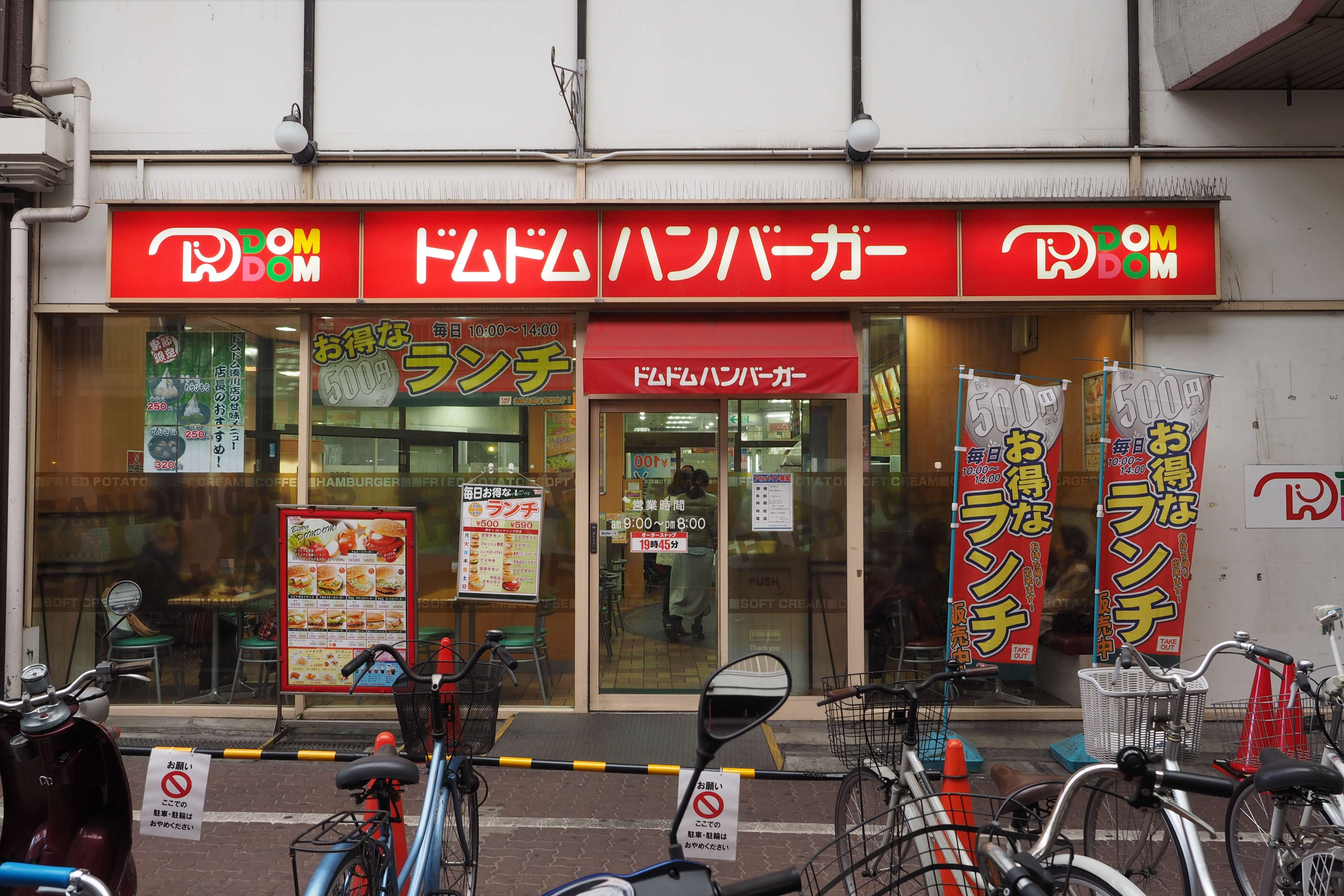 em1-20140322P3220171